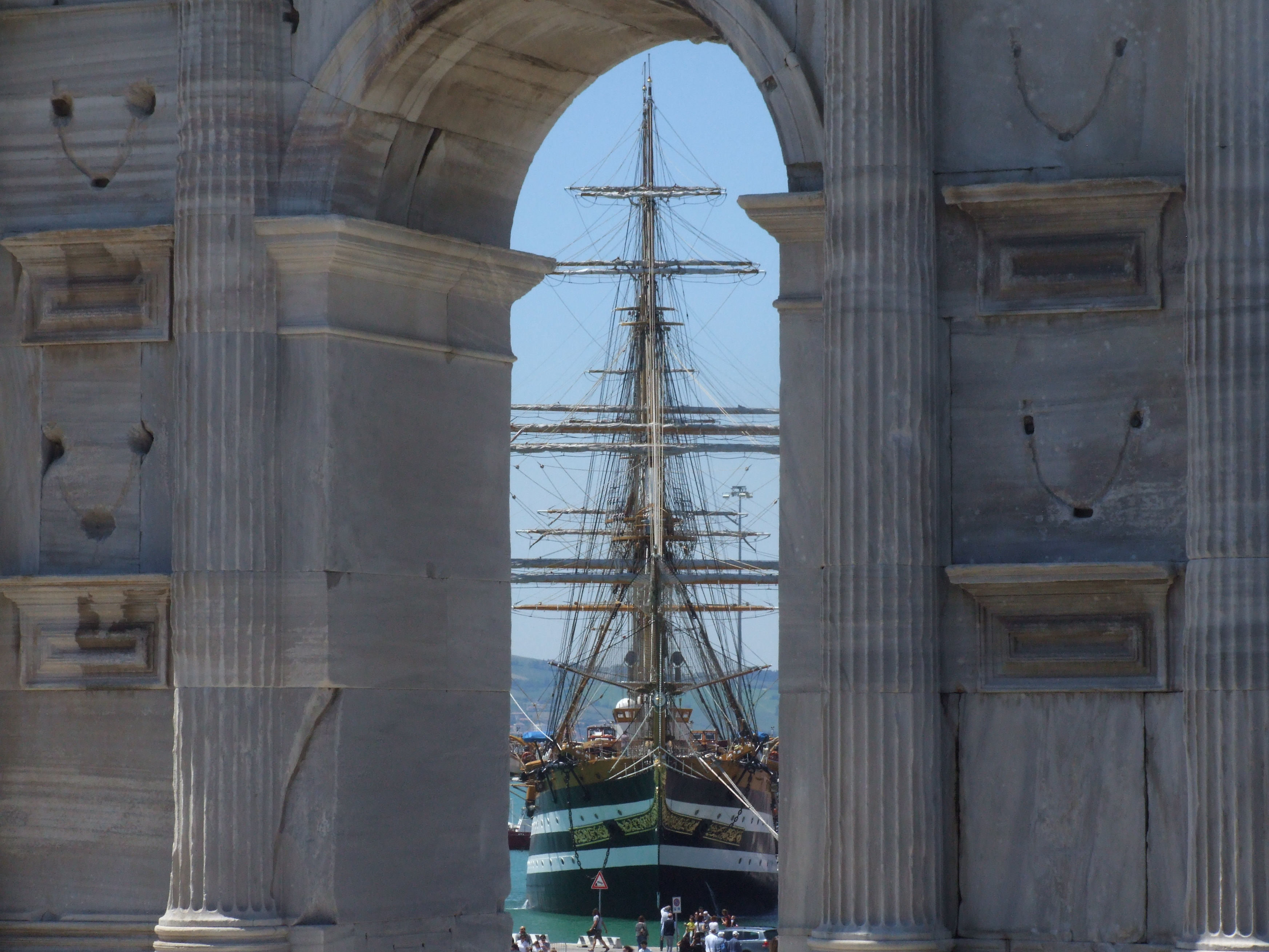 Arco di Traiano This is a photo of a monument which is part of cultural heritage of Italy.